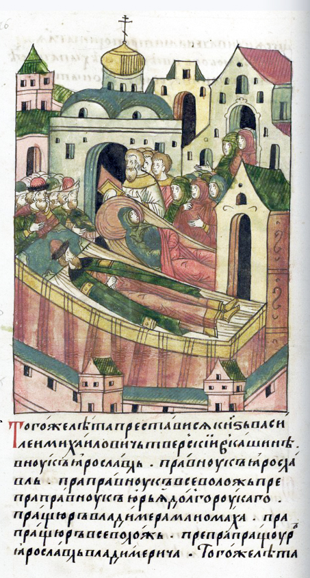 ЛИЦЕВОЙ ЛЕТОПИСНЫЙ СВОД В том же году преставился князь Василий Михайлович Тверской в Кашине, внук Ярослава, правнук Ярослава, праправнук Всеволода, препраправнук Юрия Долгорукого, потомок пращура Владимира Манамаха, прапращура Всеволода, препрапращура Ярослава Владимировича. В том же году преставилась великая княгиня София, жена великого князя Михаила Ярославича Тверского.